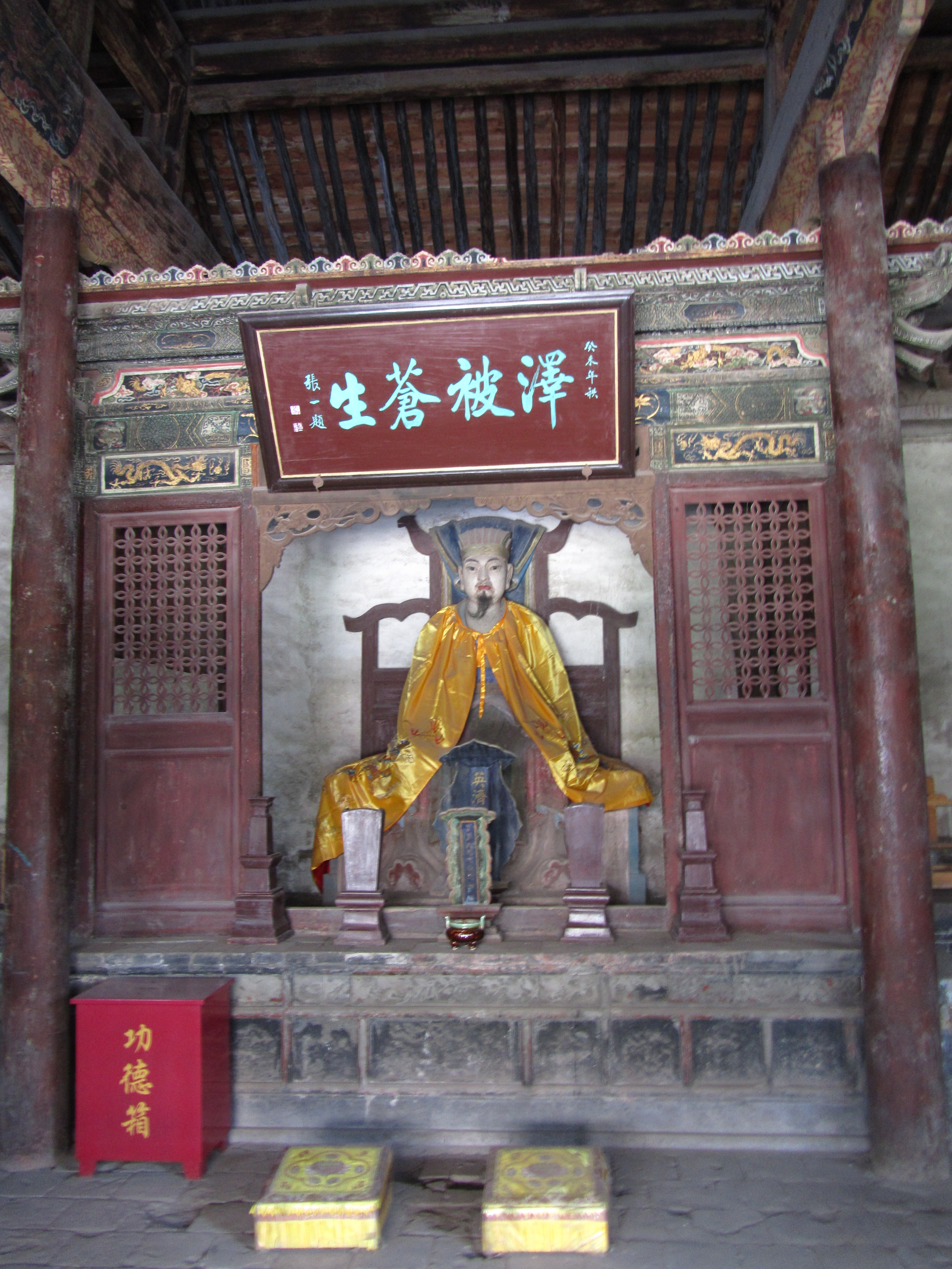 太原窦大夫祠大殿内窦犨塑像。